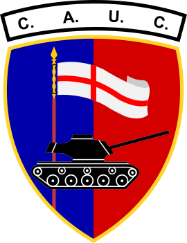 Scudetto del Campo Addestramento Unità Corazzate dell'Esercito, in vita dal 1959 al 1974, poi trasformato in 1º Reggimento Fanteria Corazzato.